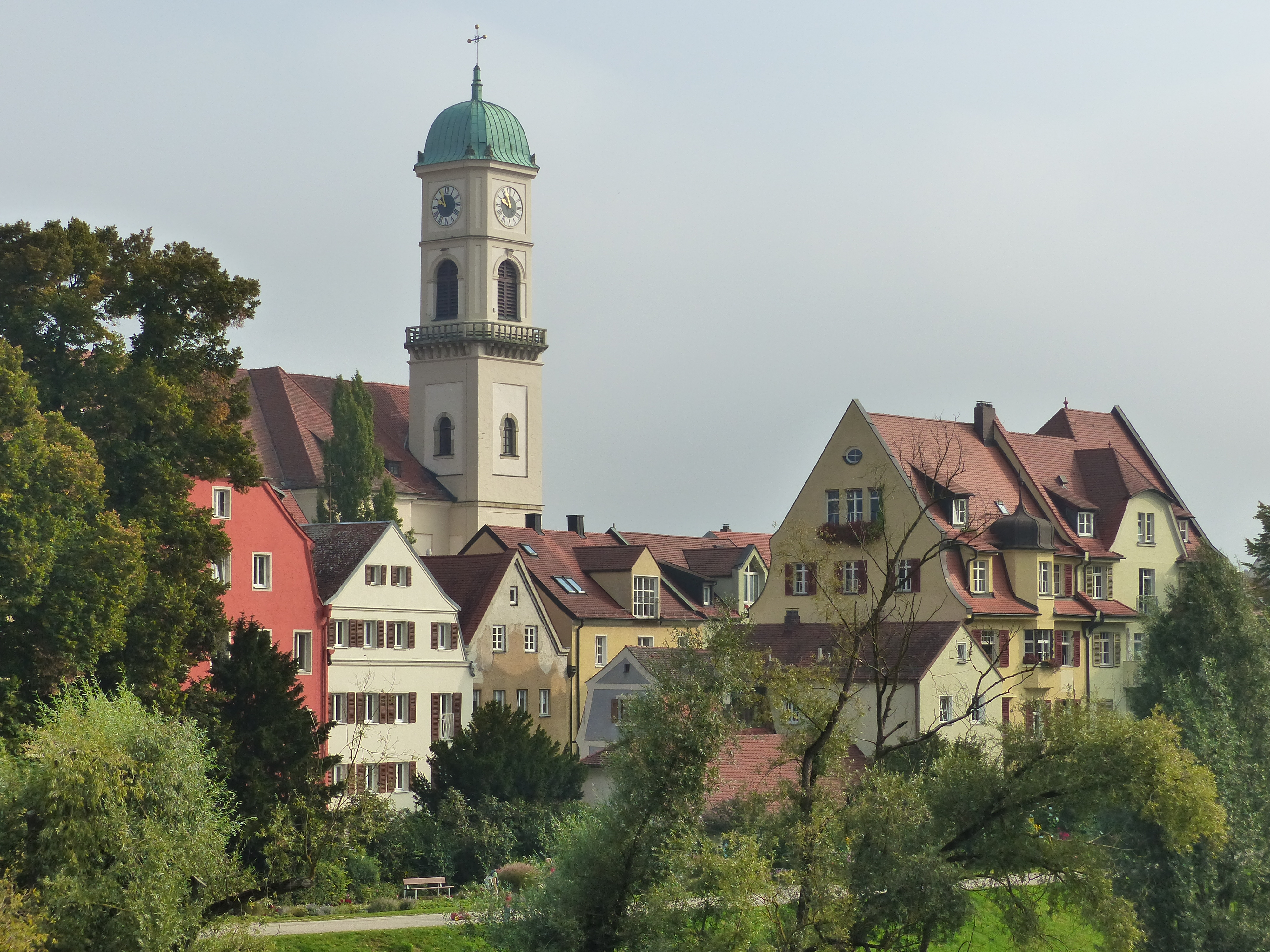 Pfarrkirche St. Mang in Regensburg-StadtamhofThis is a photograph of an architectural monument.